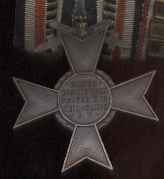 Kriegsehrenkreuz vom Ehrenbund deutscher Weltkriegsteilnehmer ist eine nichtstaatliche deutsche Weltkriegs-Gedenk-Auszeichnung, aus der Zeit der Weimarer Republik; hier: Kriegsehrenkreuz mit Schwertern; Rückseite.